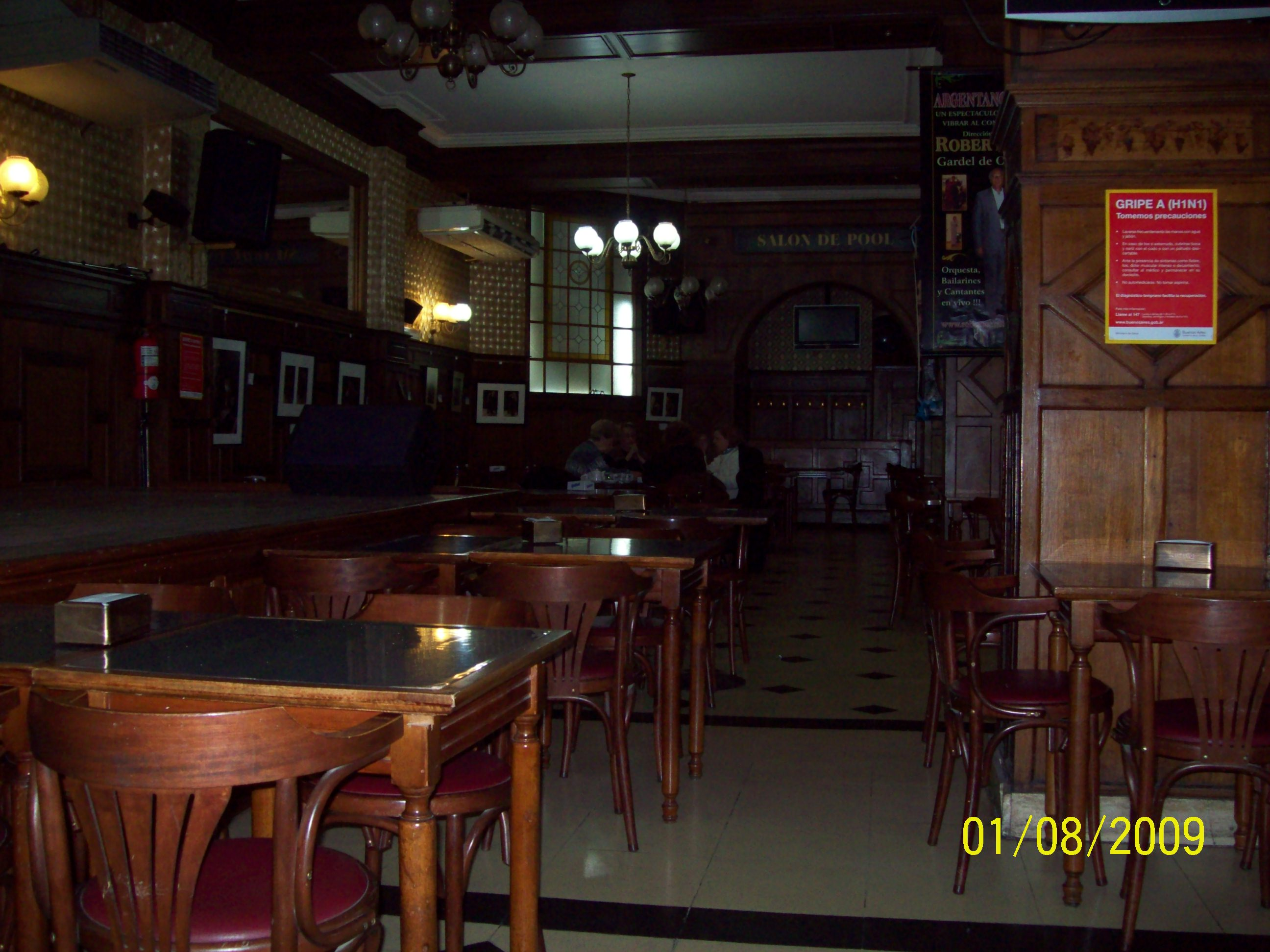 Café "Los 36 Billares"